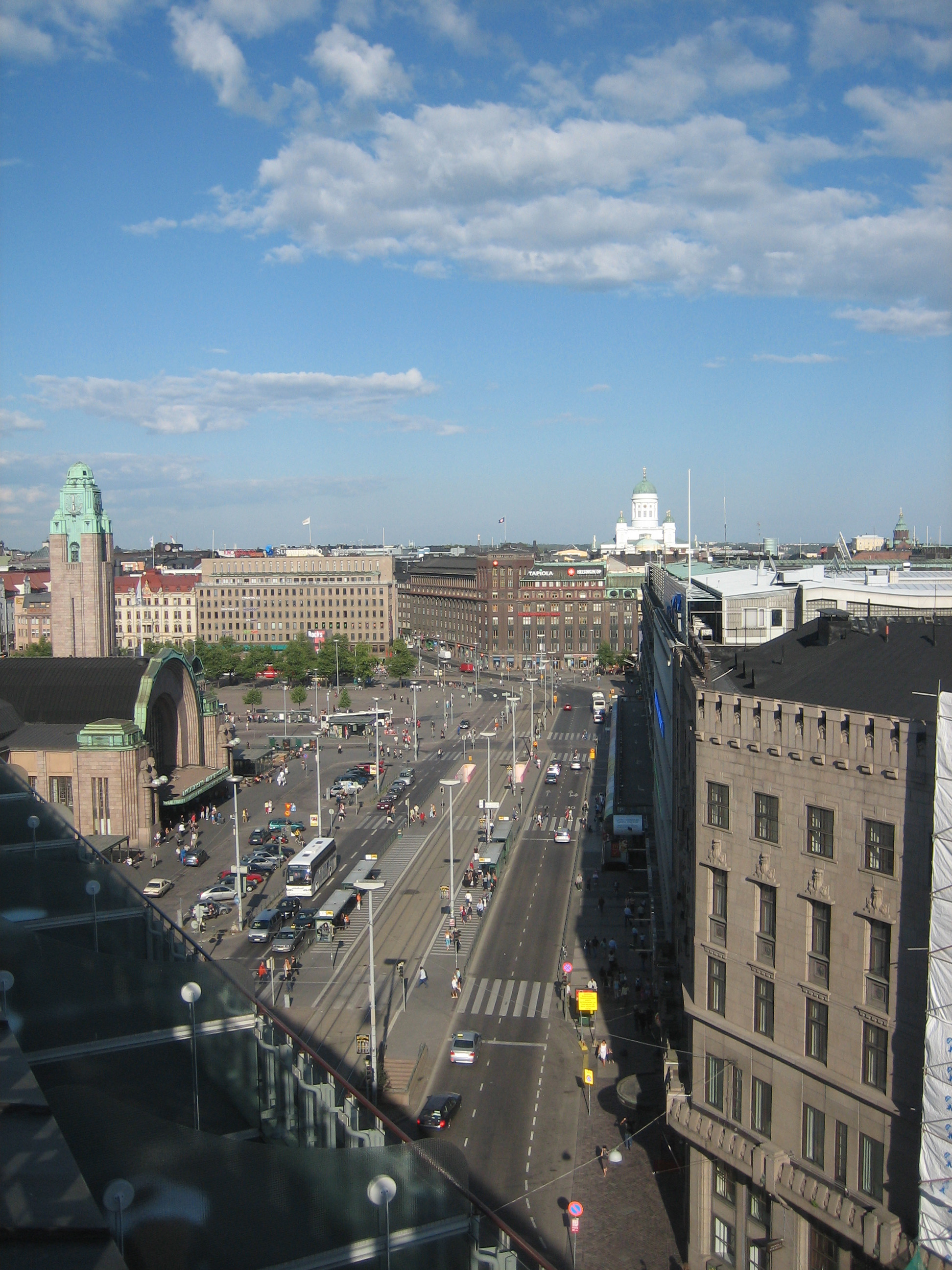 Kaivokatu Helsingissä, elokuu 2006.